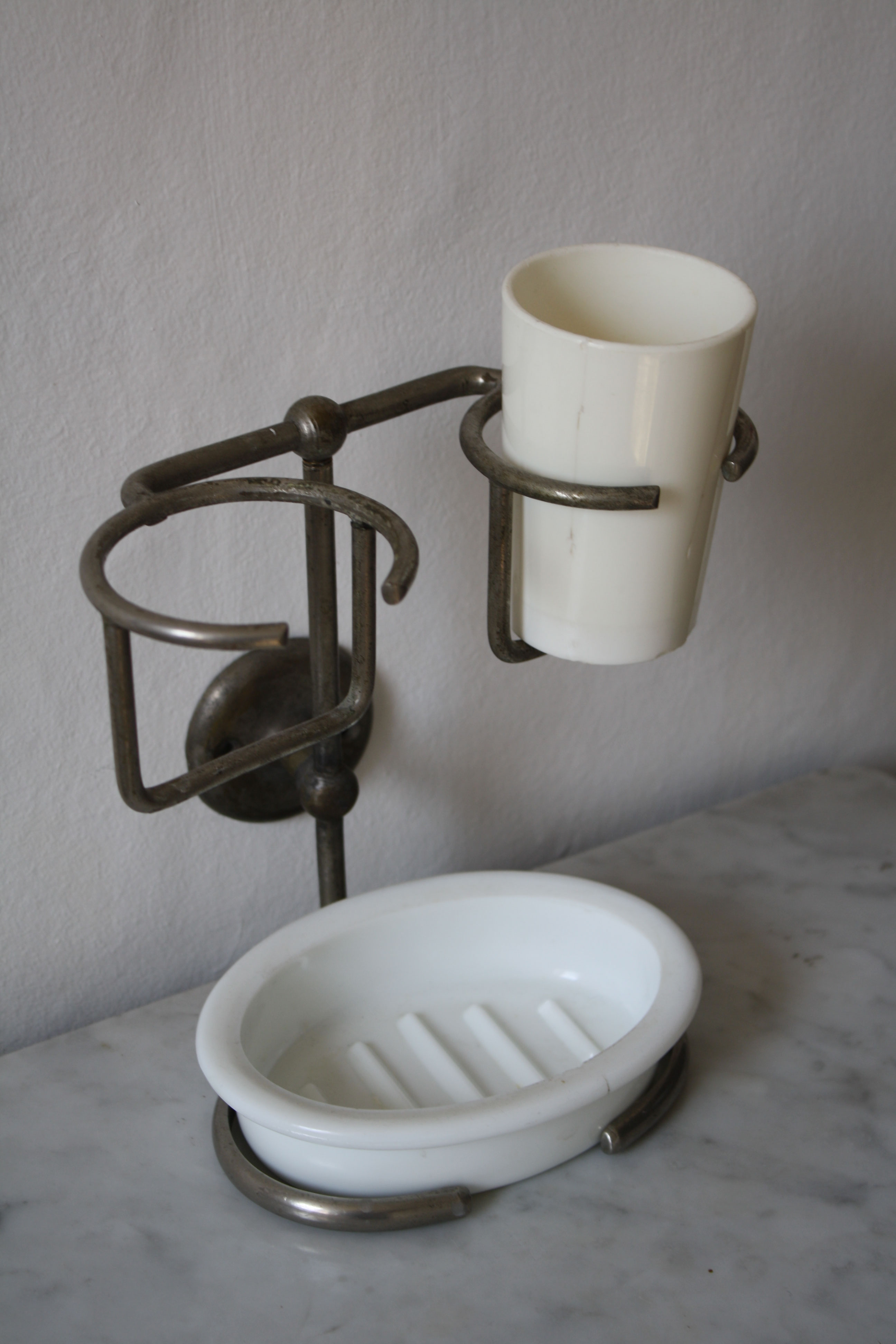 Porte-gobelet et Porte-savon en acier et faïence